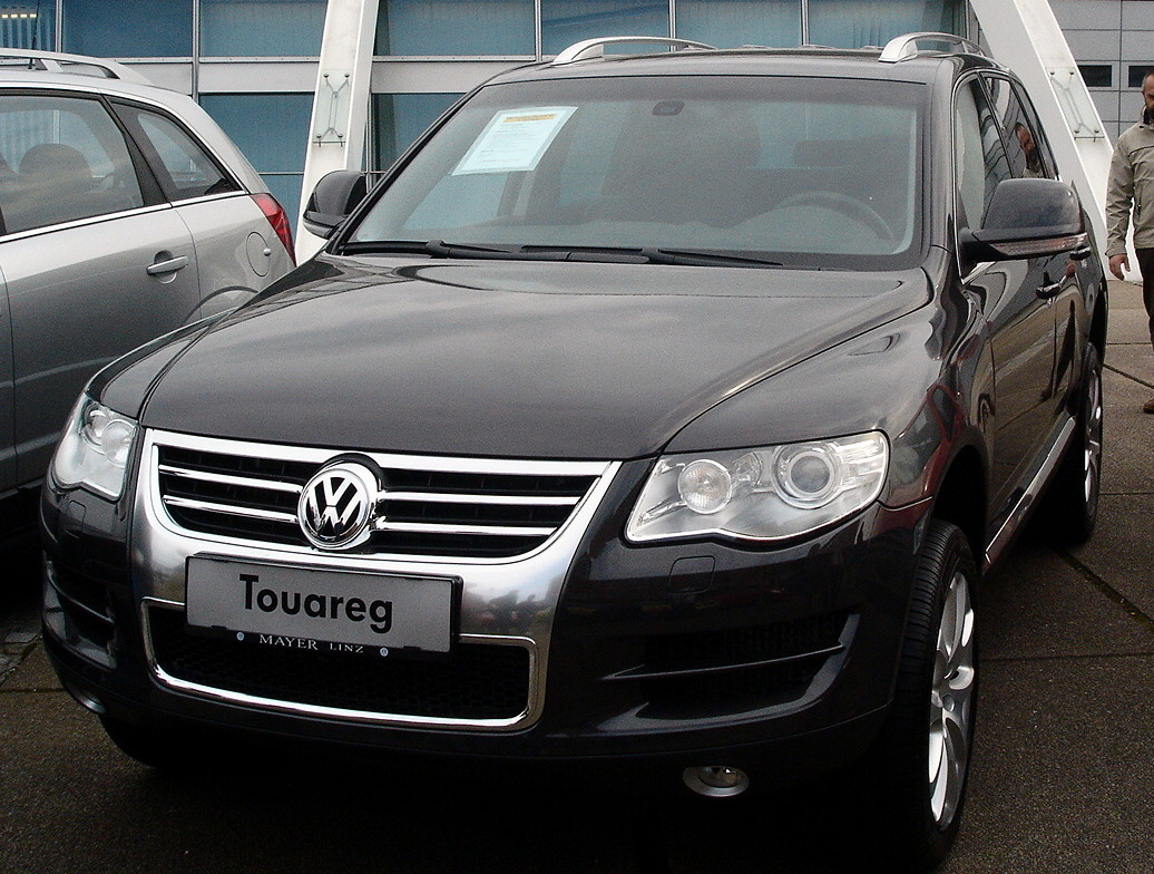 VW Touareg Facelift 2007 Frontansicht